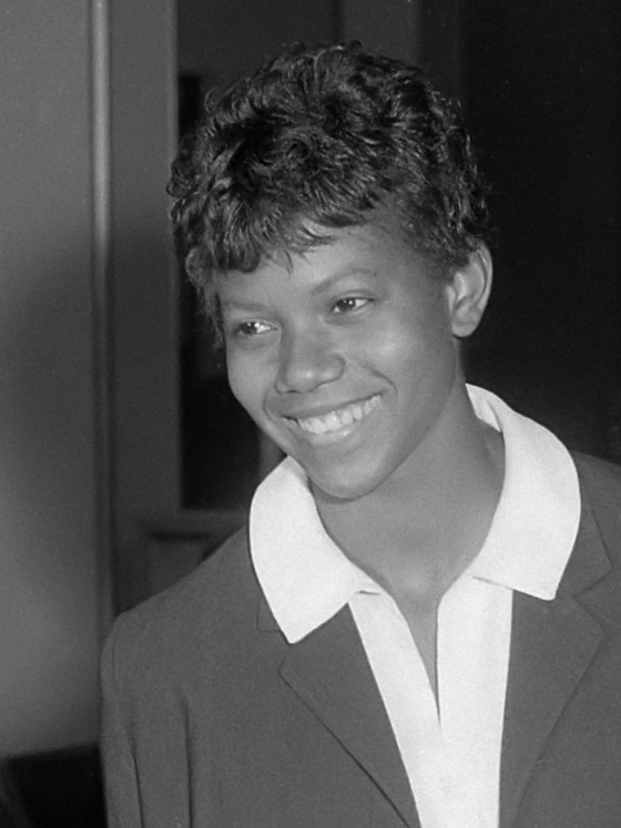 Aankomst Amerikaanse Olympische atleten op Schiphol, v.l.n.r. Otis Davis , Wilma Rudolph en Don Bragg 15 september 1960